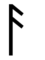 runic letter ansuz